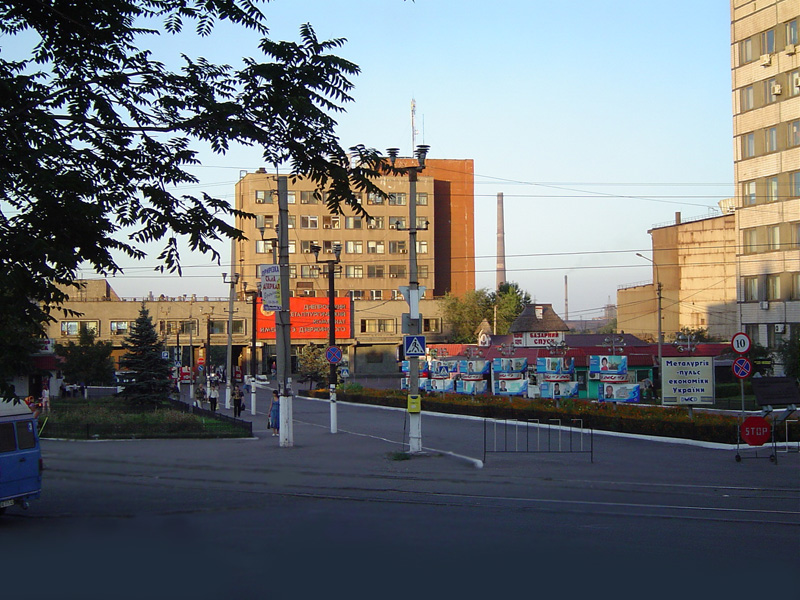 Днепродзержинск. Проходная Днепровского меткомбината им. Ф.Э. Дзержинского